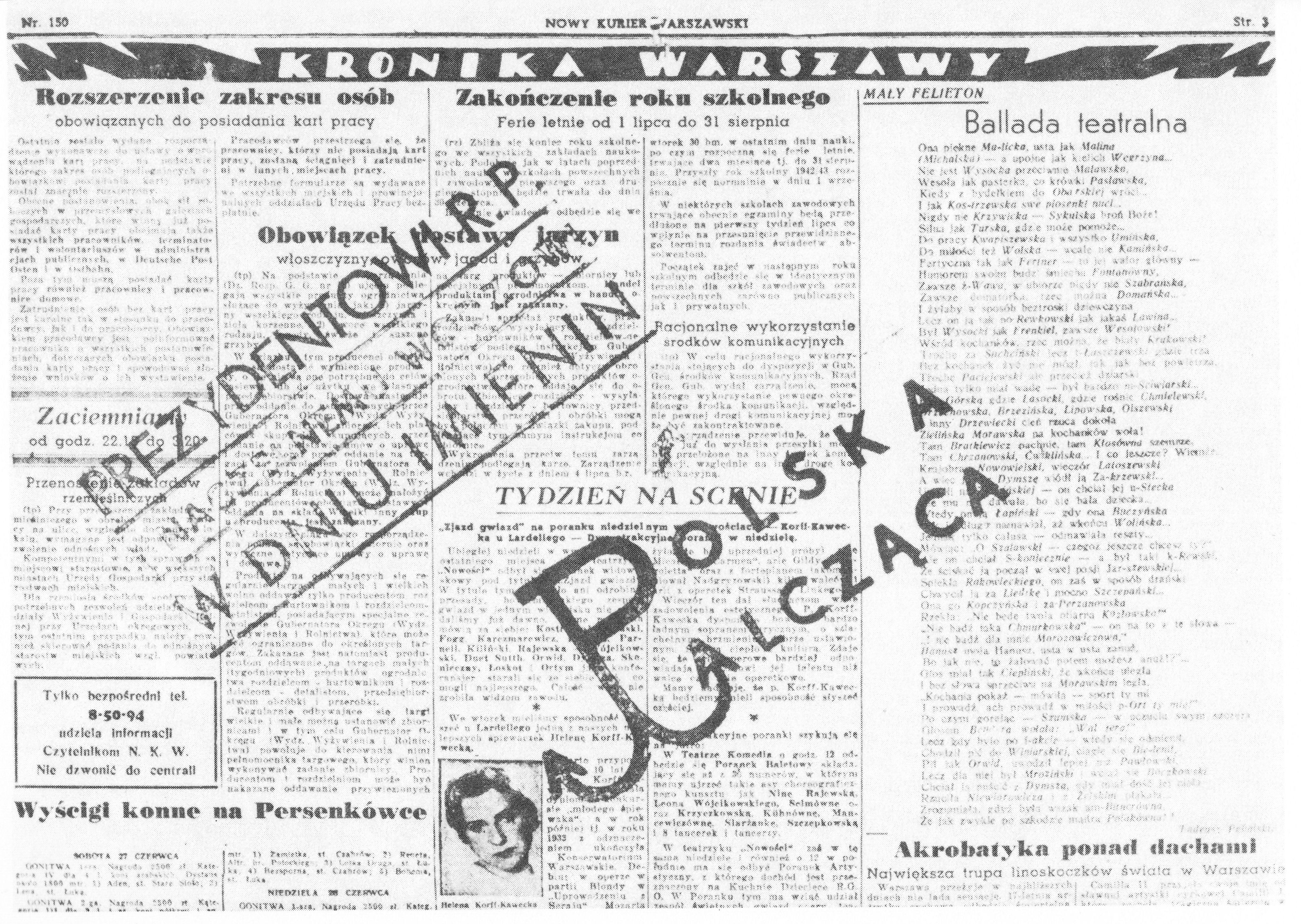 "Nowy Kurier Warszawski" ostemplowany znakiem Polski Walczącej i zyczeniami imieninowymi dla Prezydenta RP Władysława Raczkiewicza i Naczelnego Wodza Władysława Sikorskiego